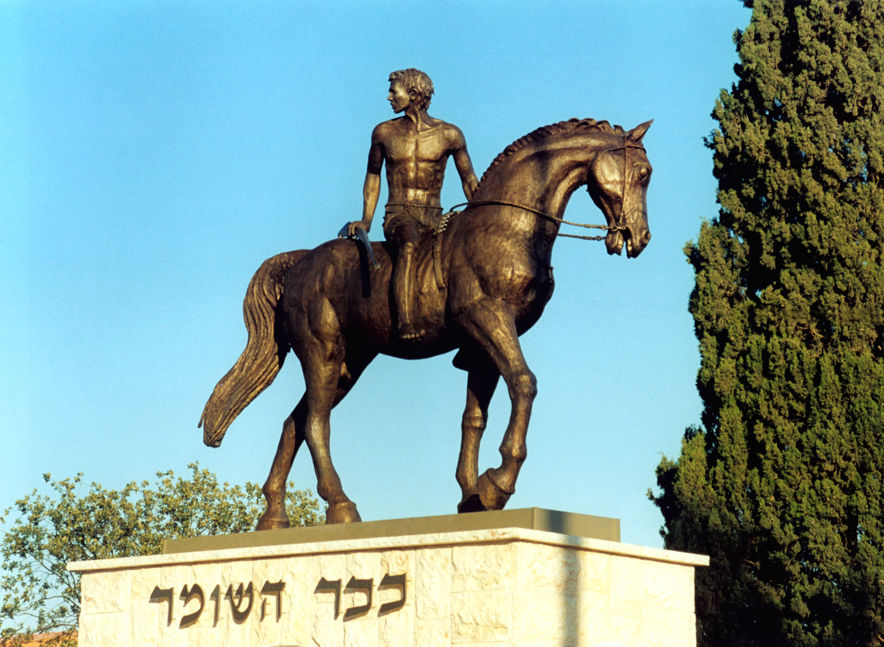 פסל:אסף ליפשיץ